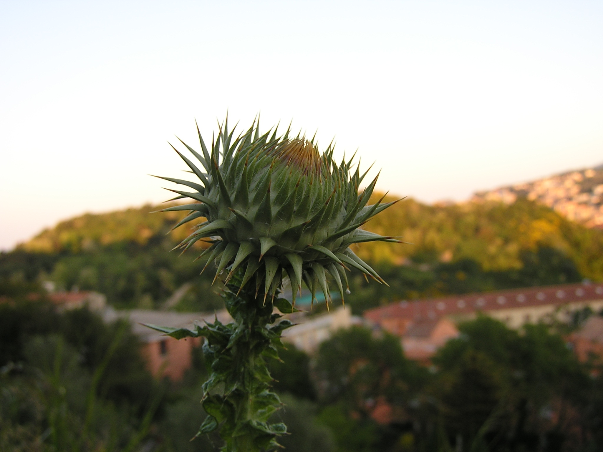 L'immagine è stata scattata nel Parco del Cardeto, al centro di Ancona. Rappresenta una pianta di cardo mariano (Silybum marianum) con un fiore ancora chiuso. Sullo sfondo si intravede Monte Cardeto, che dal cardo prende il nome.